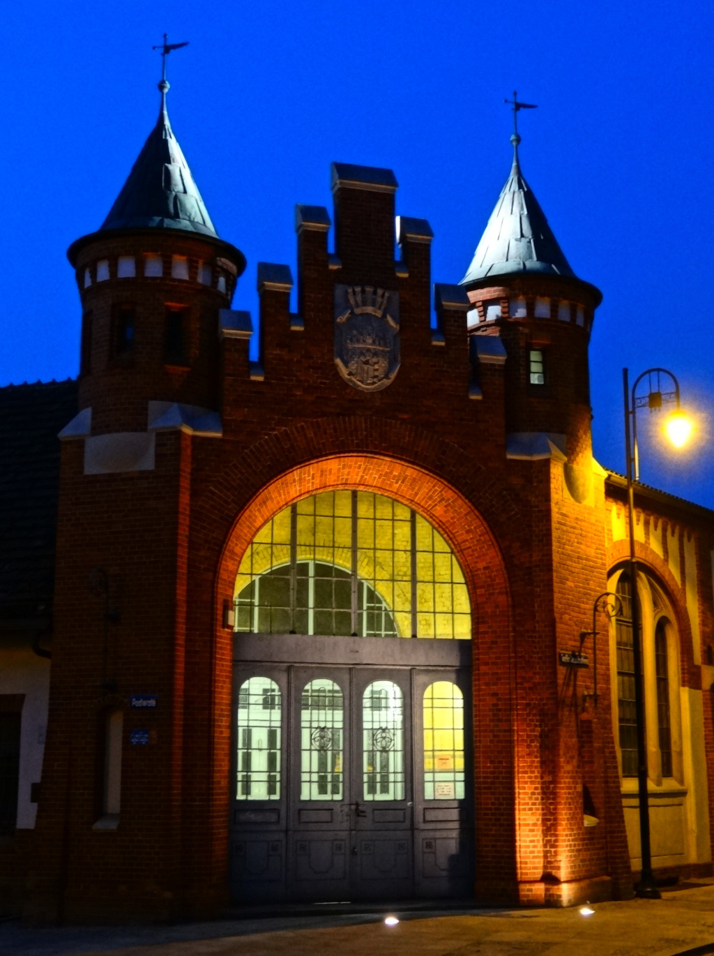 Miejska hala targowa w Bydgoszczy przy ul. Podwale bud. 1906 r.